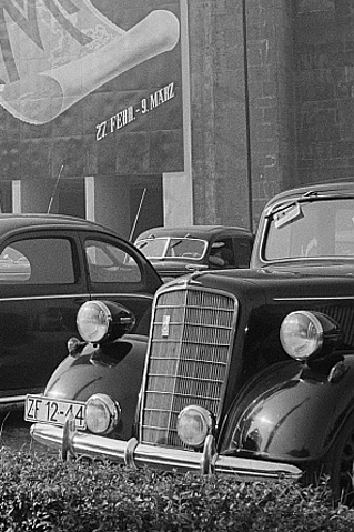 Original image description from the Deutsche FotothekParkende PKW auf dem Gelände der Leipziger Messe 1954, im Hintergrund Werbung für die Frühjahrsmesse 1955